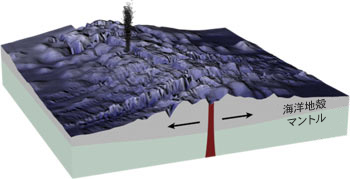 海洋地殻の構造 英語版より作成